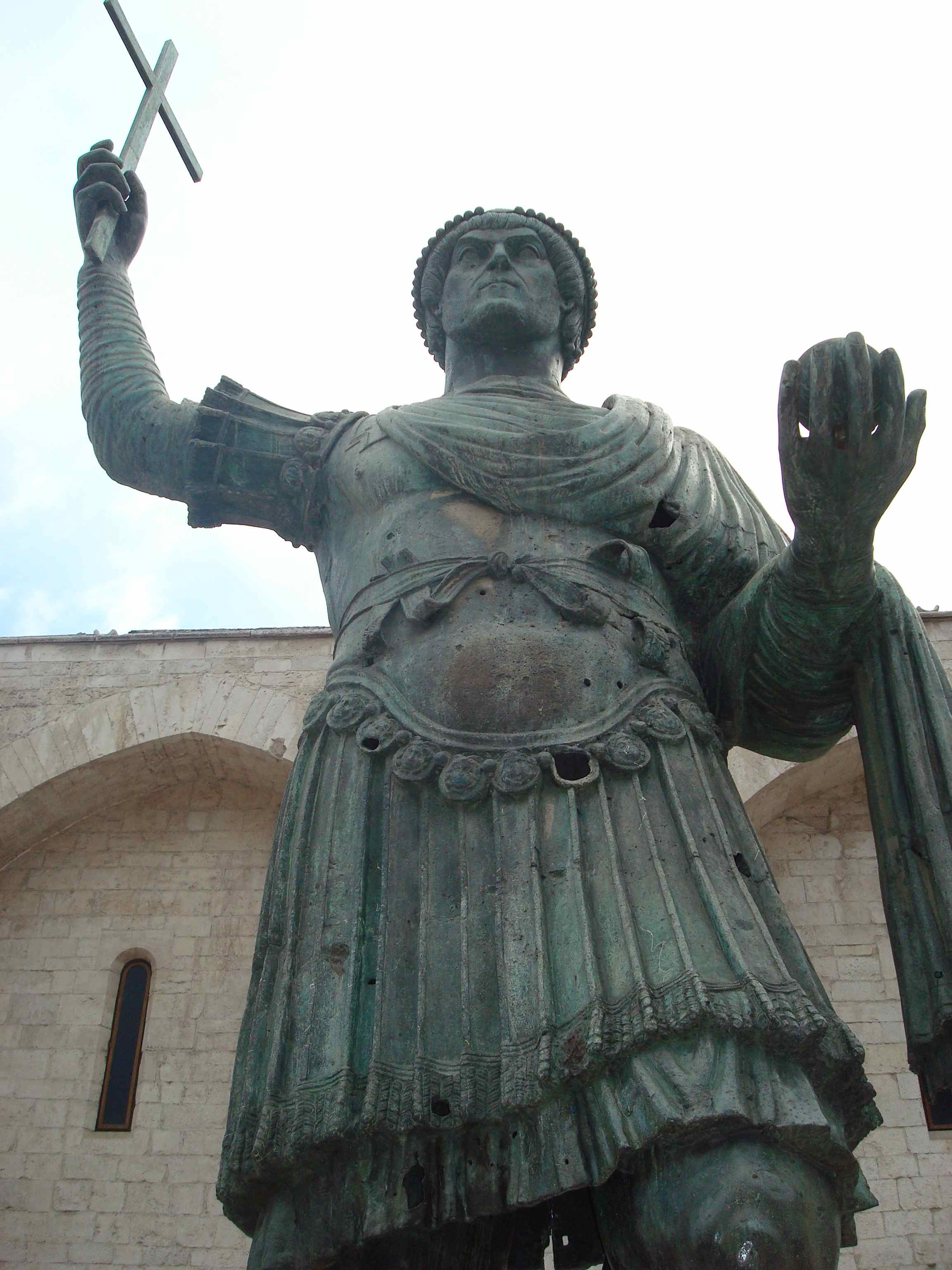 Le colosse de Barletta, statue en bronze d'un empereur romain du 4e-5e siècle